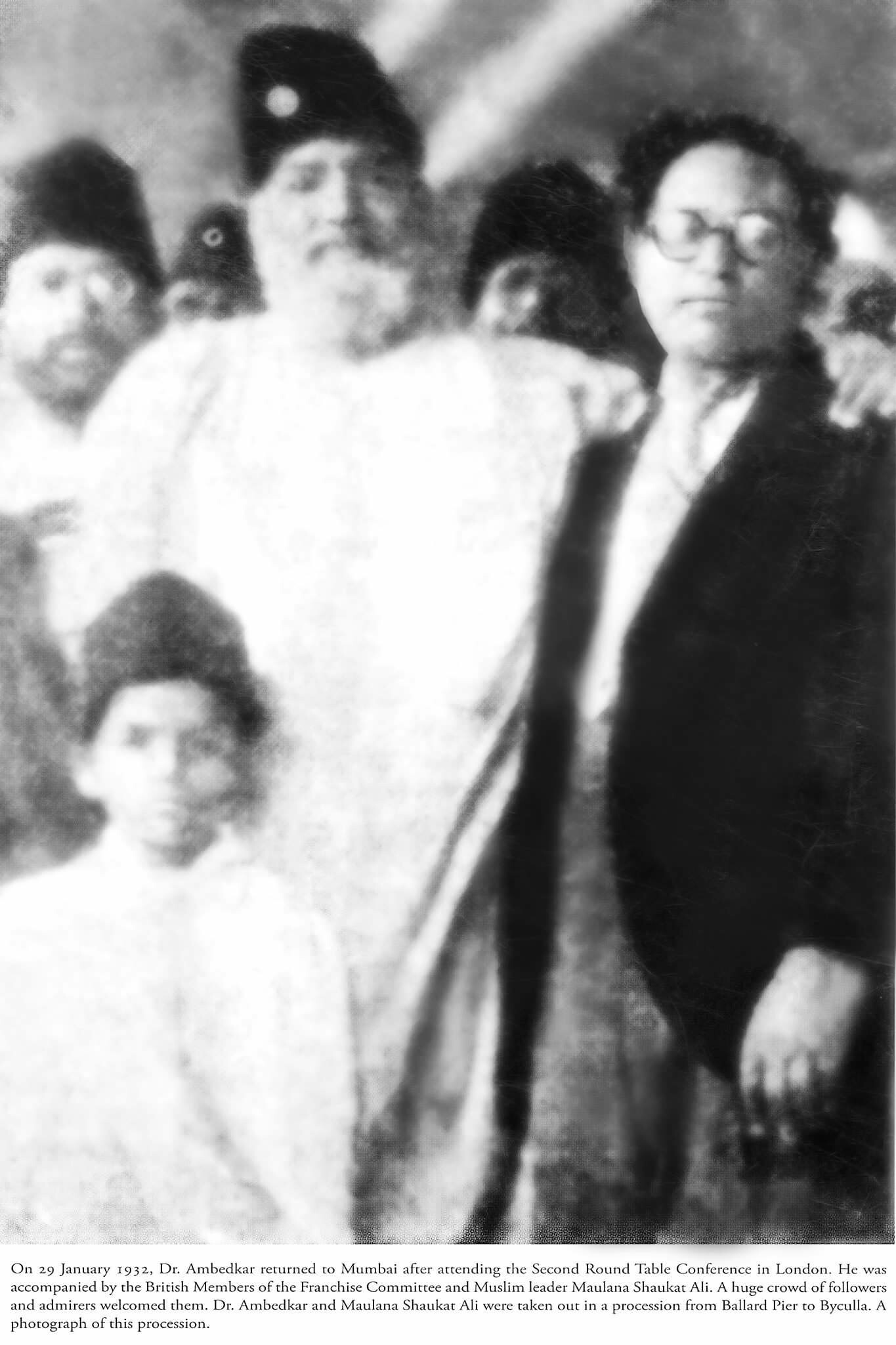 29 जानेवारी १९३२, रोजी डॉ. बाबासाहेब आंबेडकर लंडन मधील द्वितीय गोलमेज परिषद आटपवून मुंबईला परत आले.